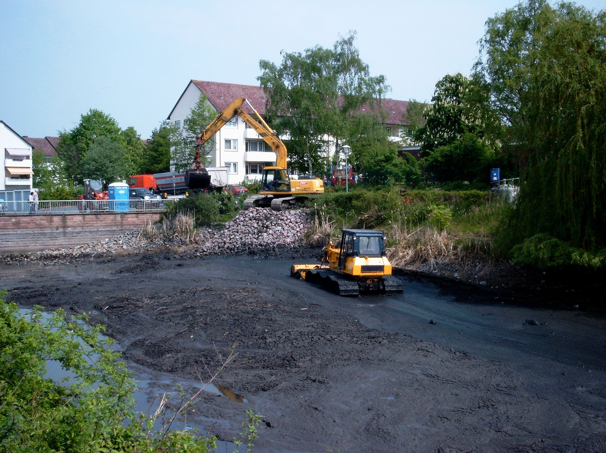 Entschlammung des Lönsteichs in Wolfsburg-Fallersleben (Niedersachsen) im Mai 2005